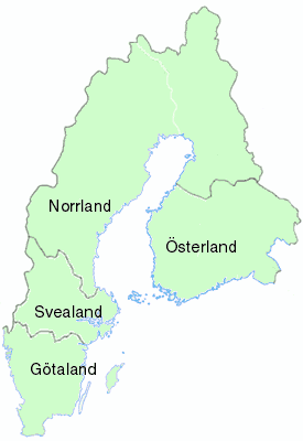 Historical Lands of Sweden / Karte der Landsdelar des Königreichs Schweden in den Grenzen von 1634.